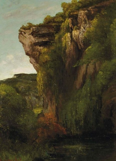 La Cascata Courbet 1874 Henri Hecht